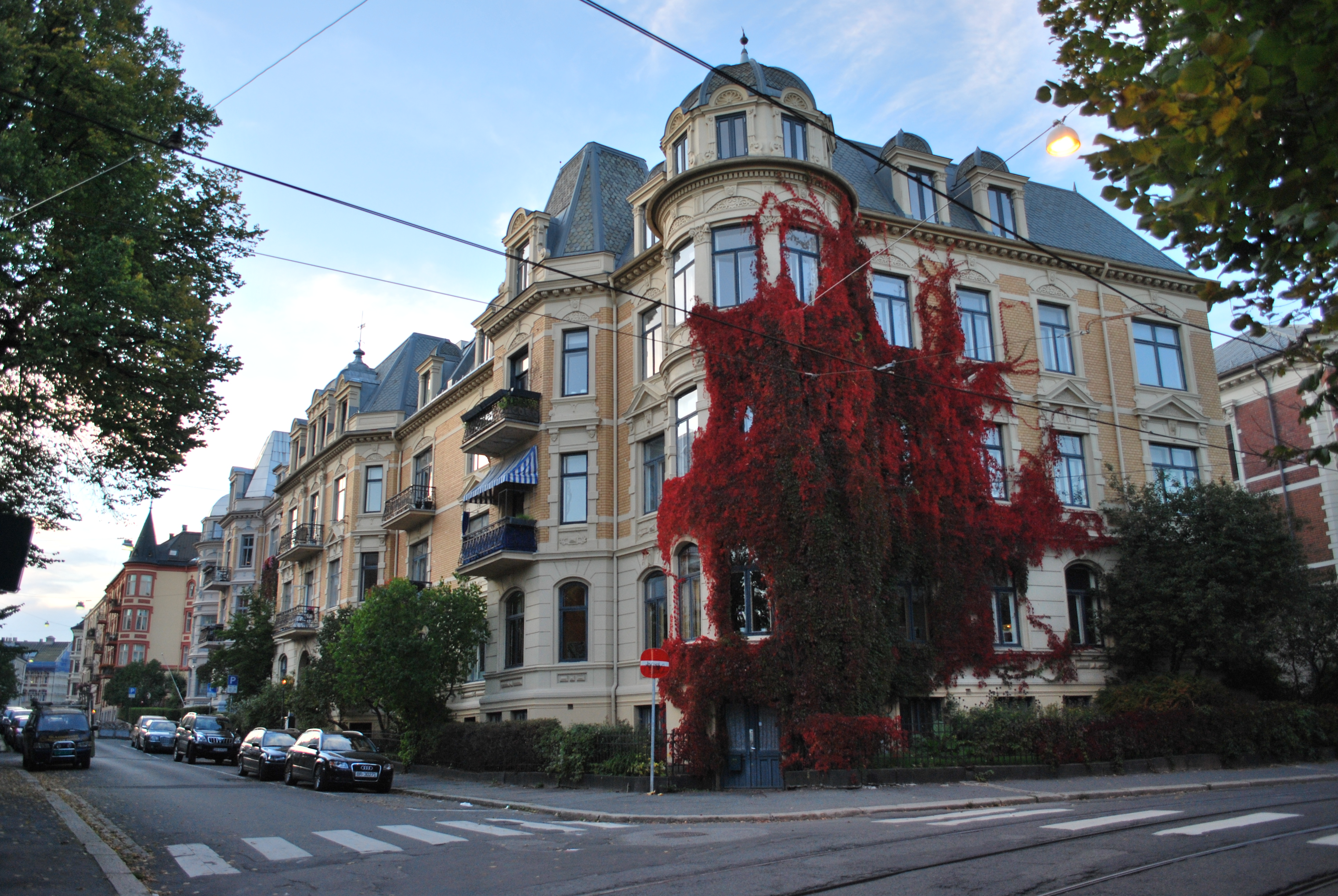 Apartment houses, 1899, Briskeby/Uranienborg, Oslo